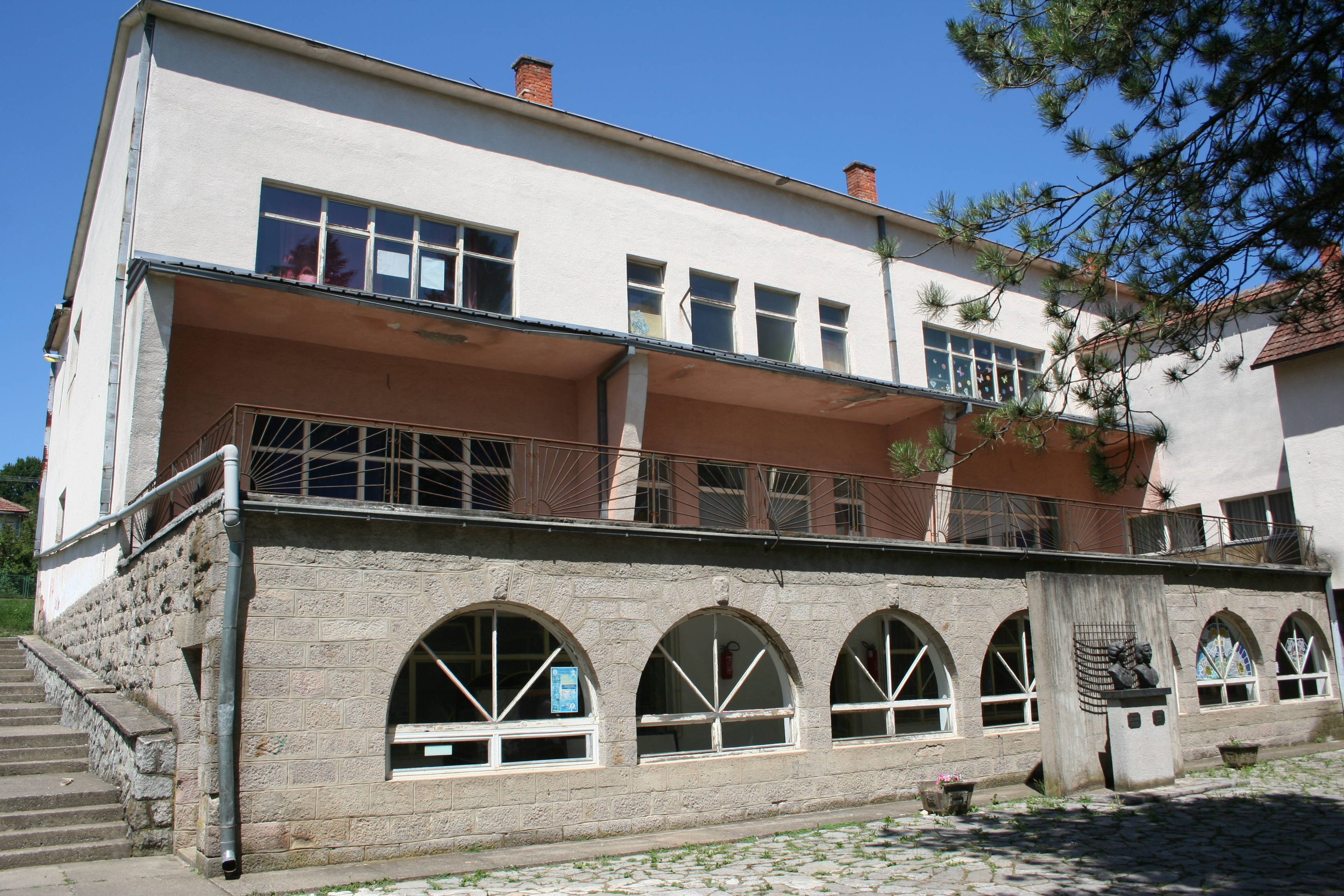 Osnovna škola